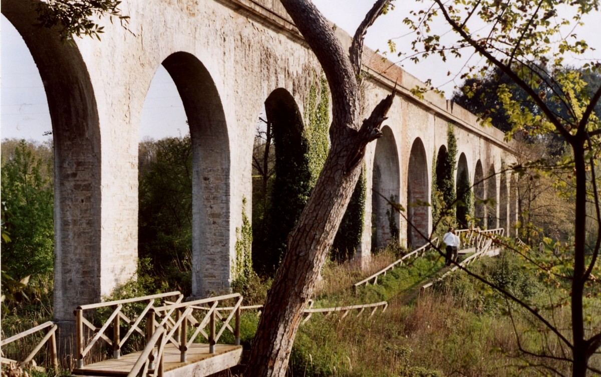 Livorno: arcate dell'Acquedotto Leopoldino o di Colognole, qui nel tratto ubicato all'interno del comune labronico, presso il Cisternino di Pian di Rota. L'acquedotto ha origine a Colognole, sulle colline alle spalle di Livorno e raggiunge la città dopo un percorso di 18 km. Attualmente alimenta solo alcuni paesi e frazioni dell'entroterra. Queste arcate furono realizzate alla fine del Settecento: successivamente Poccianti costruì due "casotti" di ispezione ai margini delle stesse arcate. Photo 2006